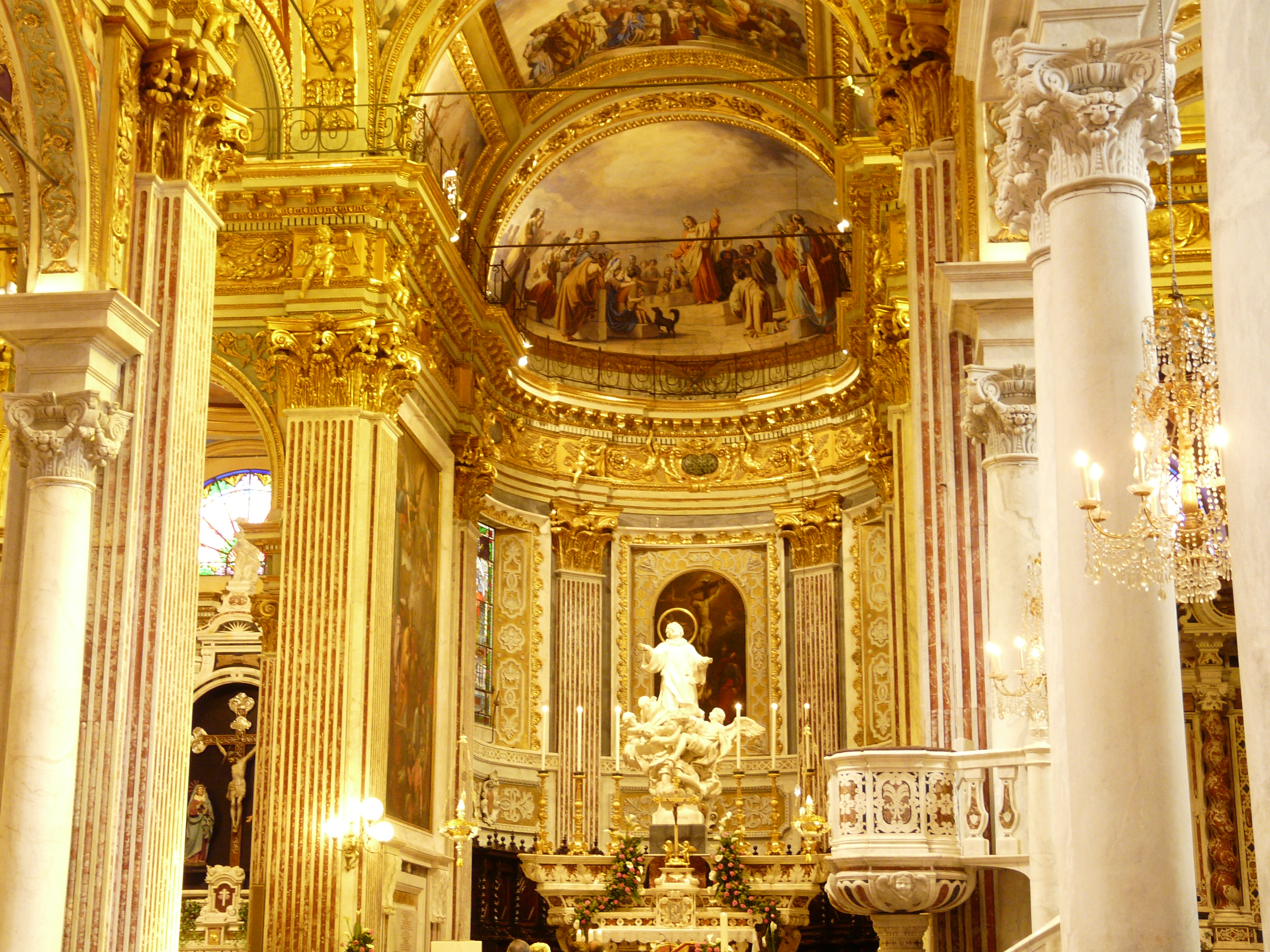 Interno della basilica di Santo Stefano, Lavagna, Liguria, Italia